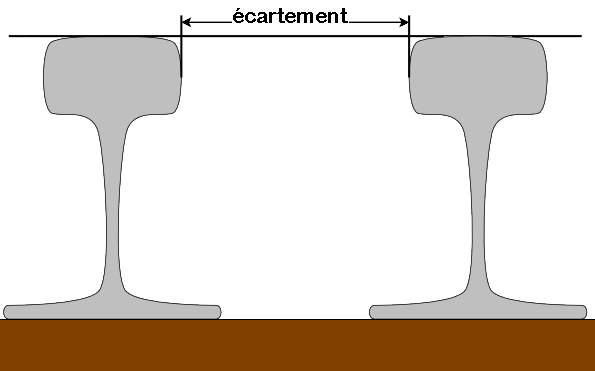 Schéma de mesure de l'écartement des rails de chemin de fer. (Rail gauge)